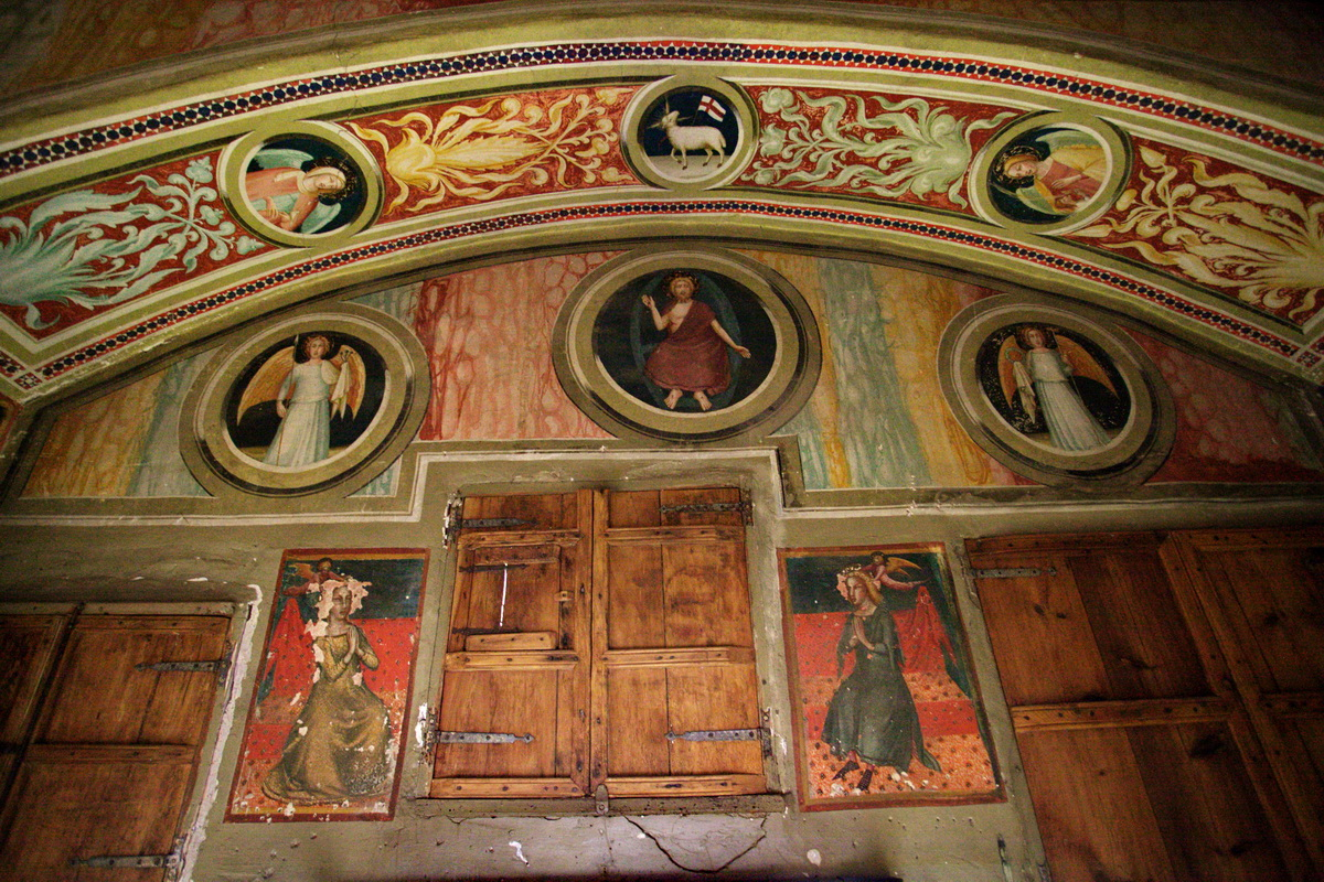 Conjunt d'imatges de la part superior de la paret on es troba la porta de la cel·la.